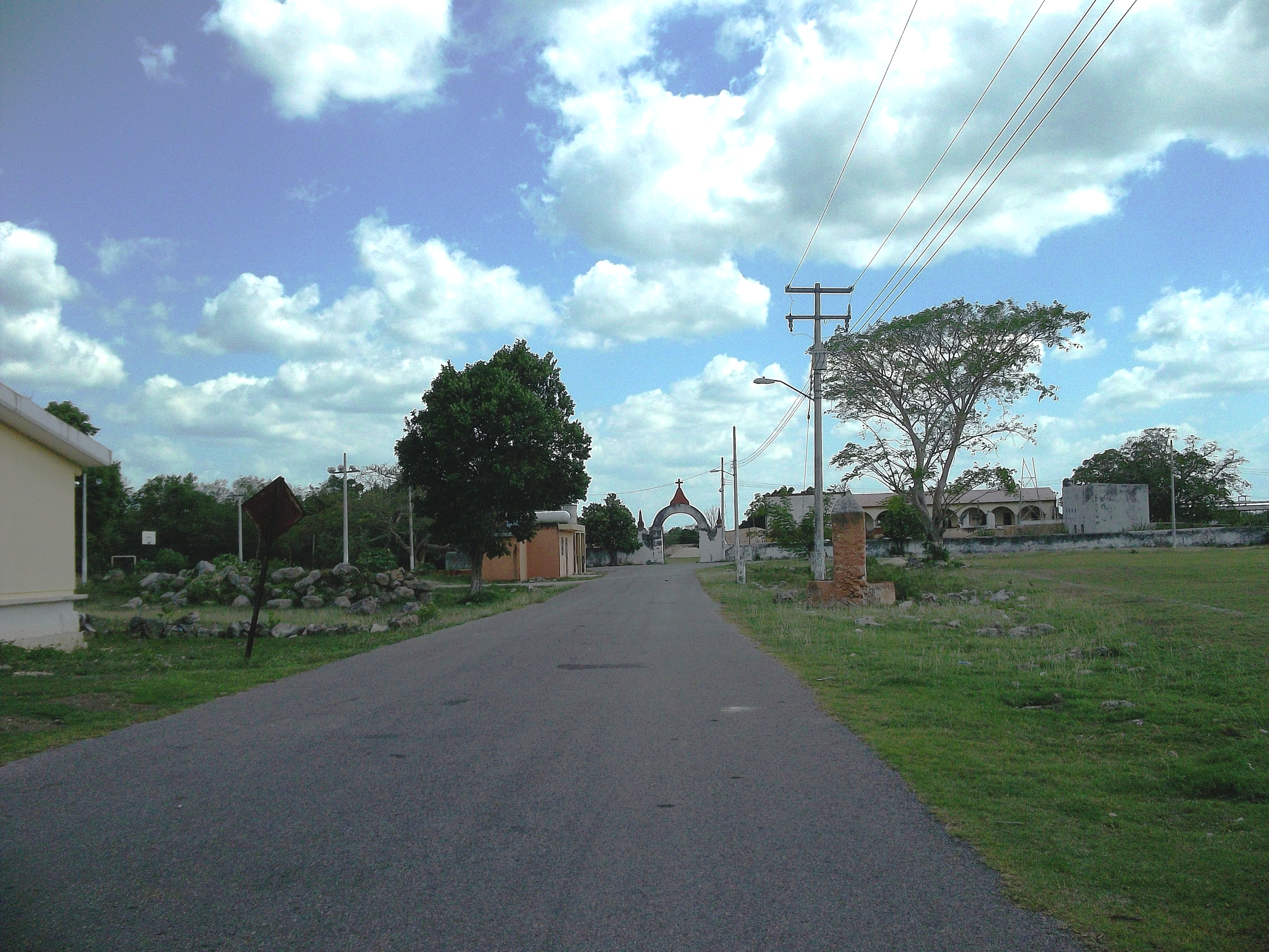 Arco de la hacienda de Hubilá, Yucatán.